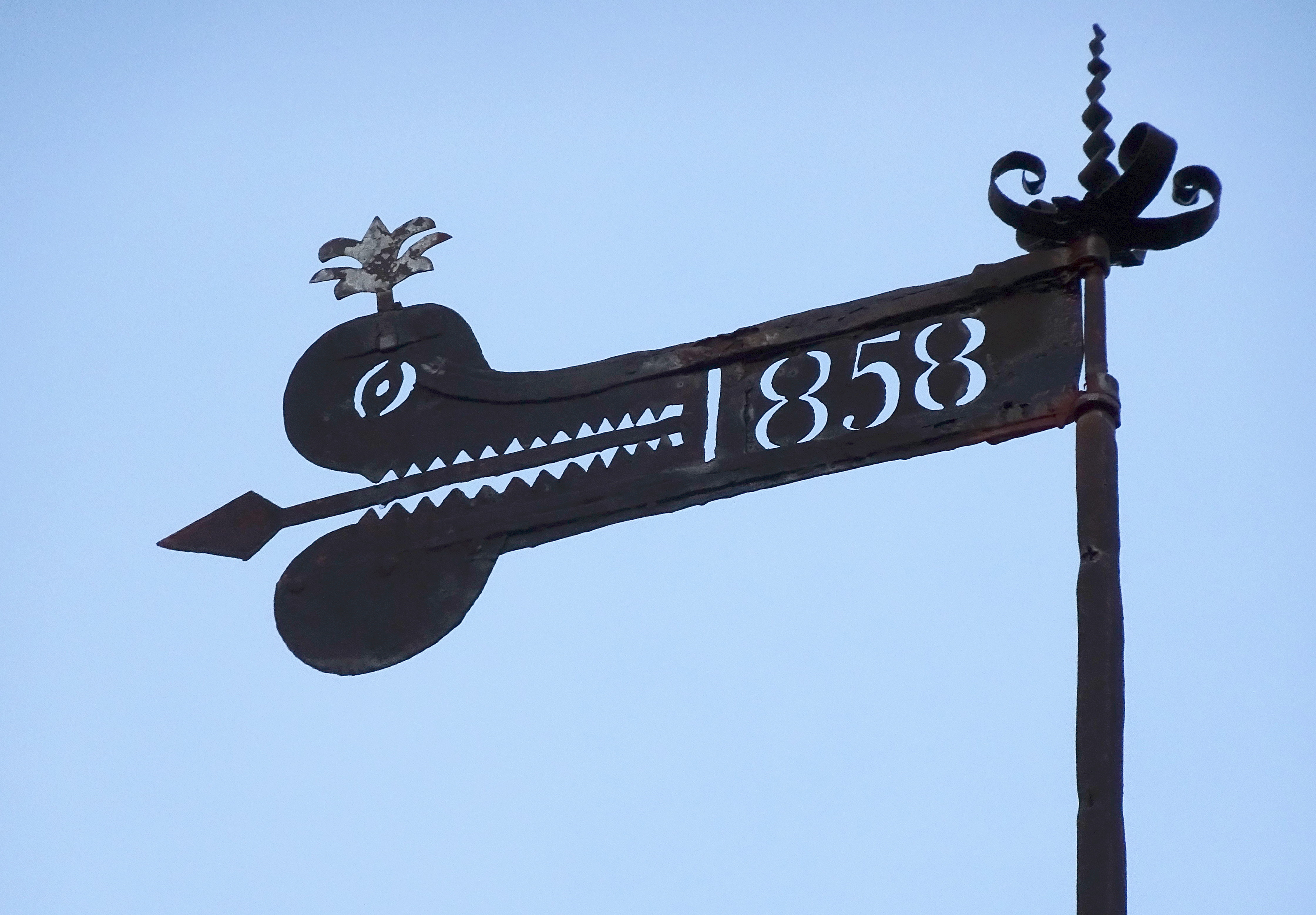 Klockstapeln på Flaggberget, Drottningholm